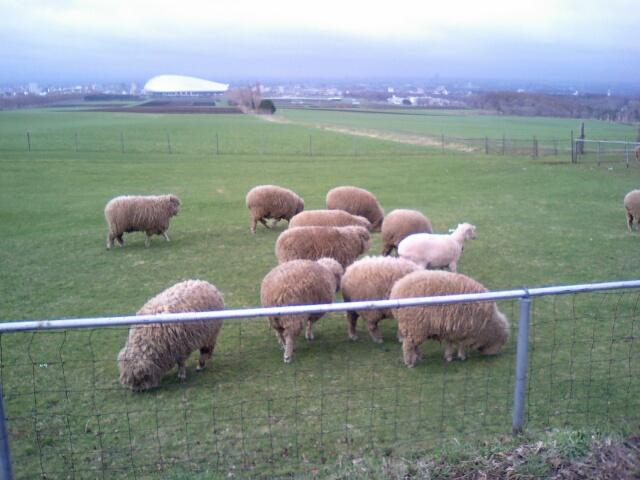 Sheep in Hitsujigaoka observation hill